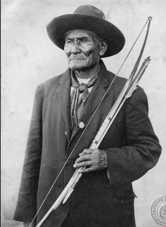 자신의 활과 화살을 가진 제로니모